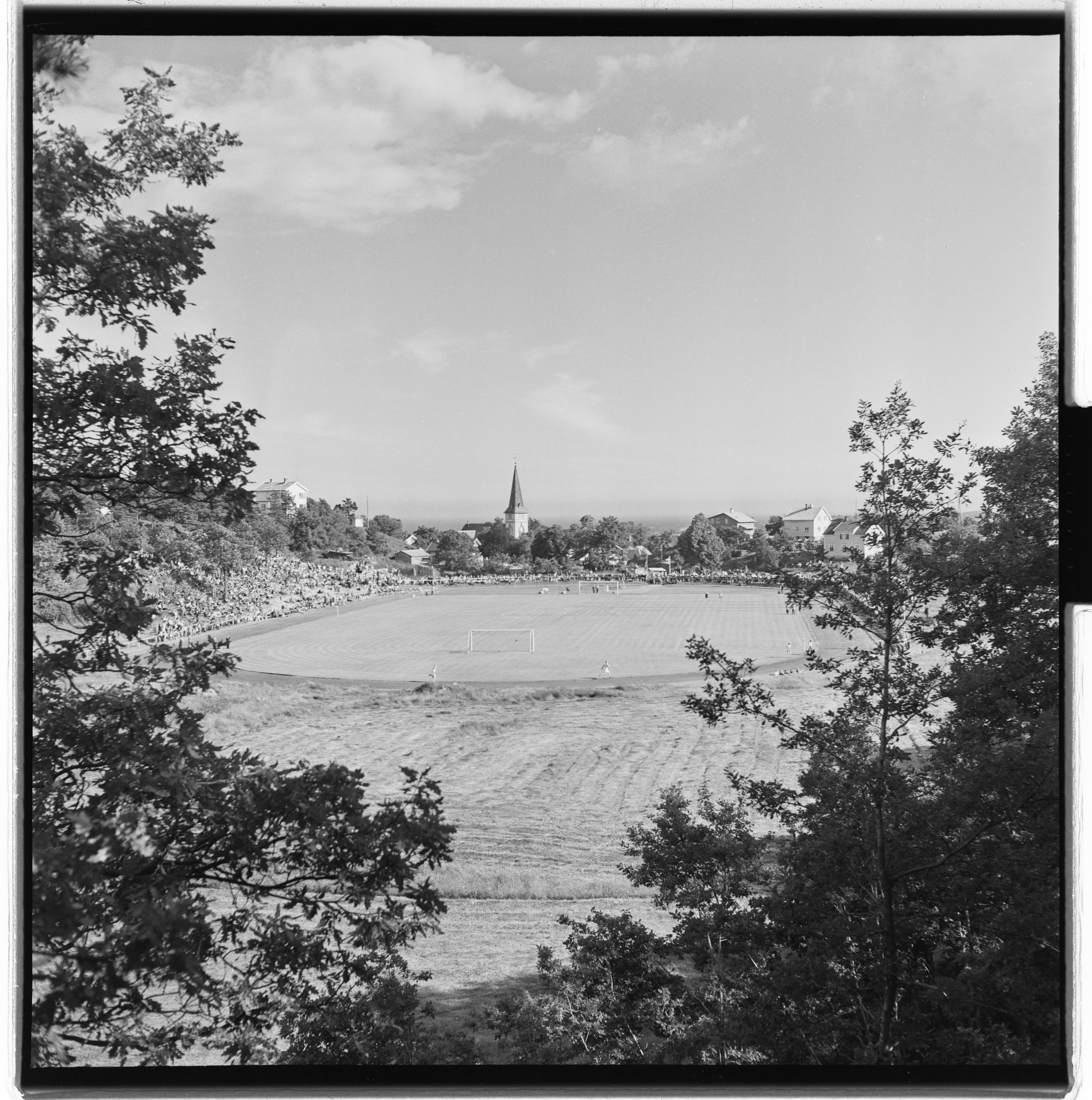 Bildet er hentet fra Arkivverket. Foto tatt i forbindelse med åpning av Grimstad Stadion. Jerv møtte Lyn i åpningskampen. Arkivinstitusjon : Riksarkivet Arkivnavn : Billedbladet NÅ Sted : Norge, Aust-Agder, Grimstad, Grimstad Emneord: Fotball, Idrettsanlegg Avbildet